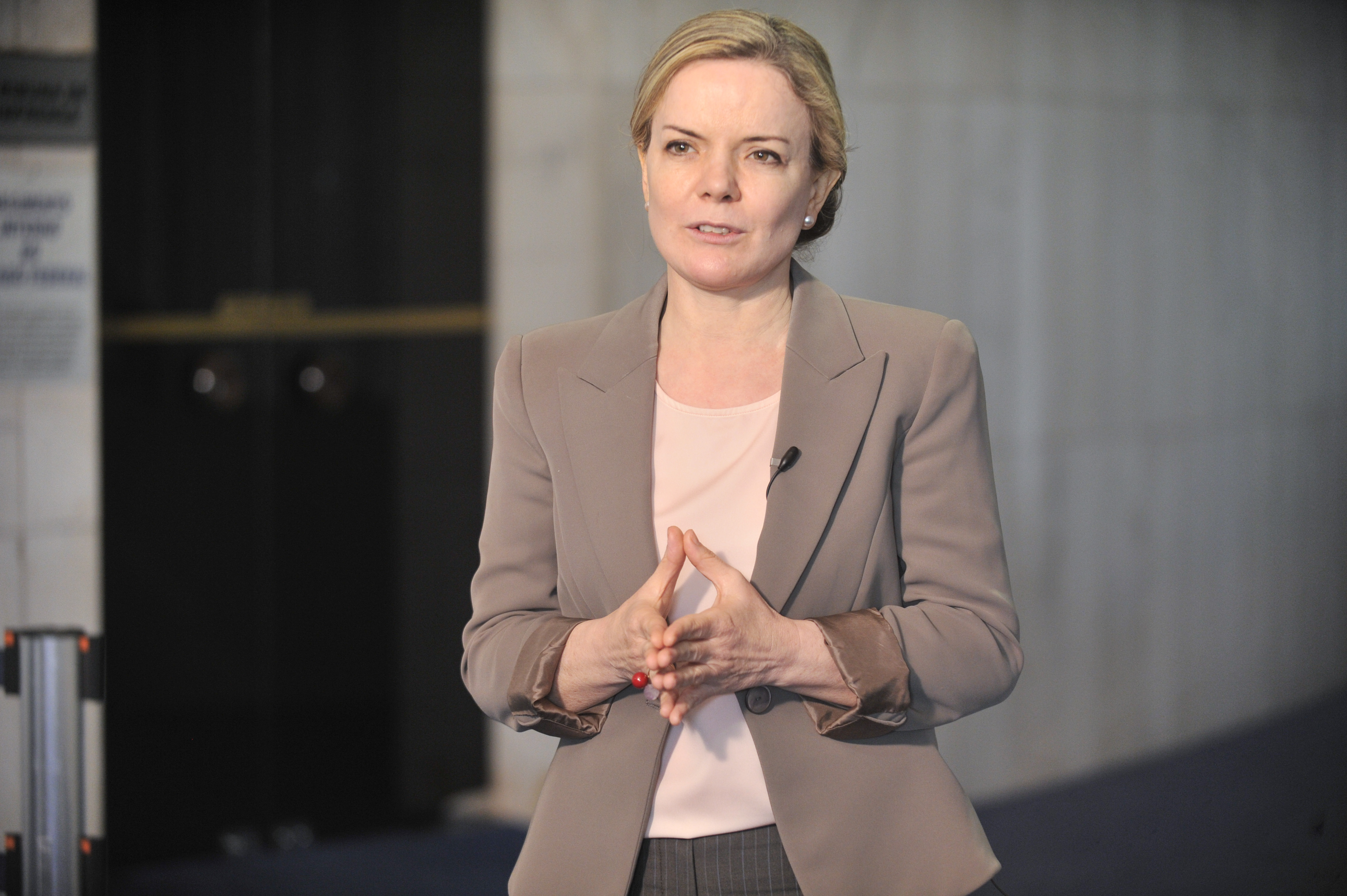 Senadora Gleisi Hoffmann (PT-PR) concede entrevista. Foto: Waldemir Barreto/Agência Senado